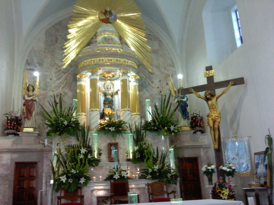 virgen de la asuncion